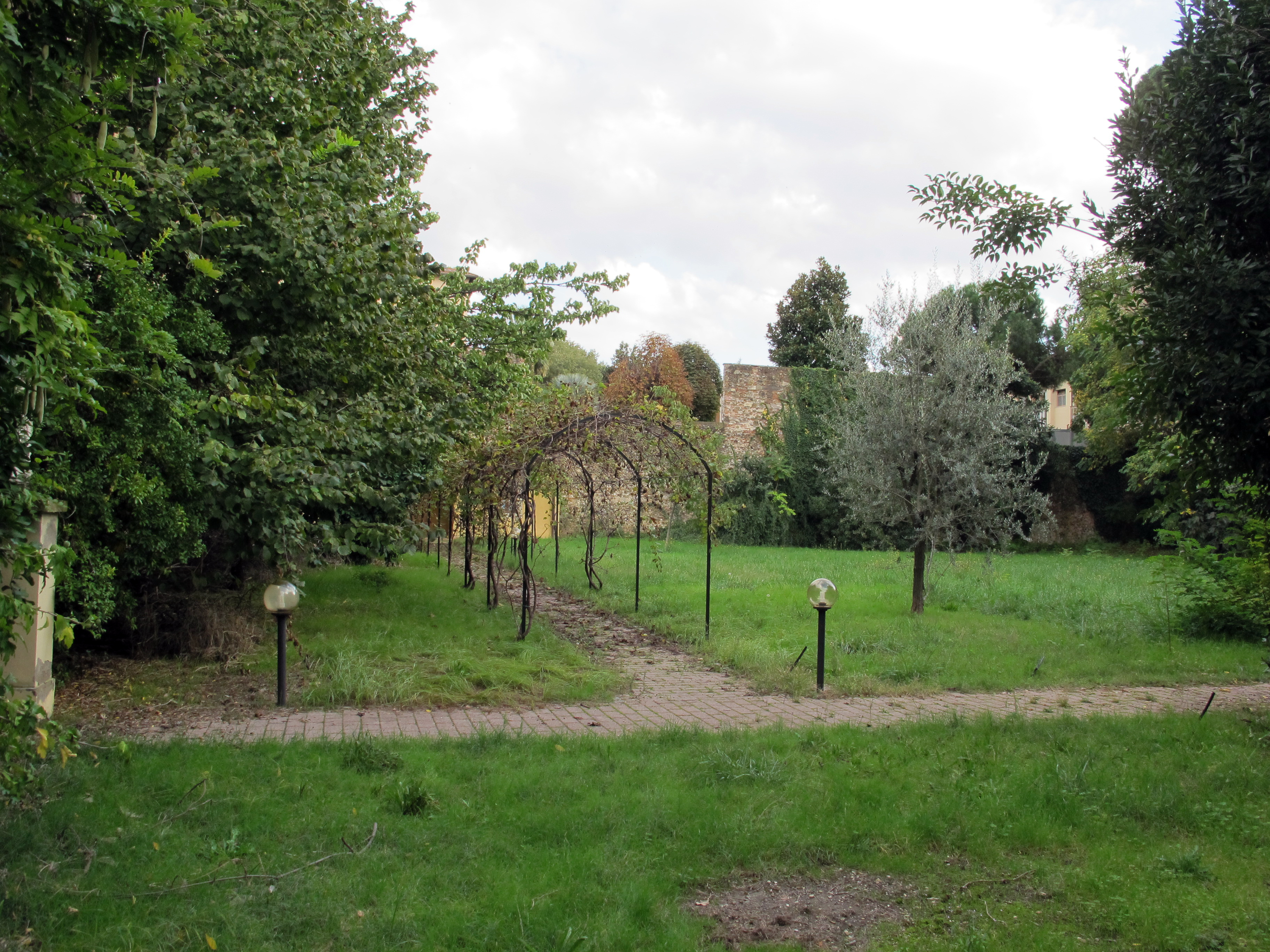 Borgo Pinti, Firenze